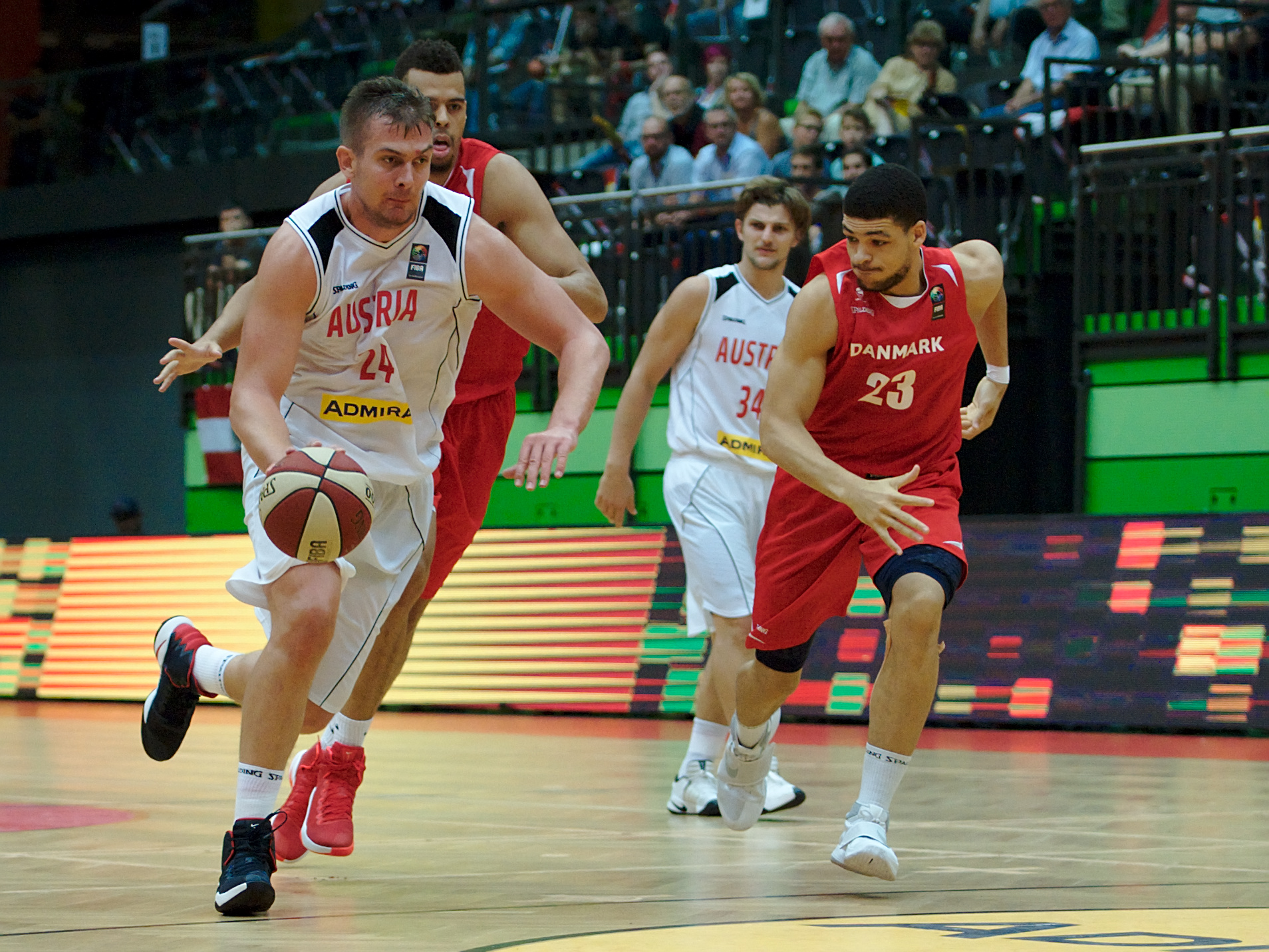 FIBA-Basketball EM-Qualifikation am 7.9.2016 im Multiversum in Schwechat, Österreich - Dänemark. Bild zeigt Rašid Mahalbašić (AUT), Jonas Bergstedt (DEN) und Gabriel Lundberg (DEN).